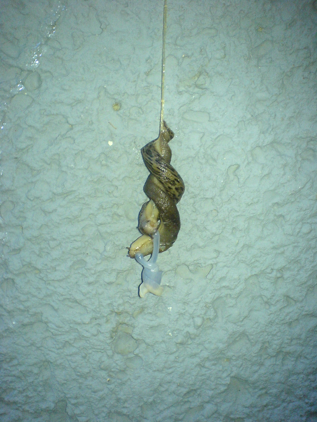 Zwei Tigerschnegel bei der Paarung, aufgenommen in Wien (Österreich)